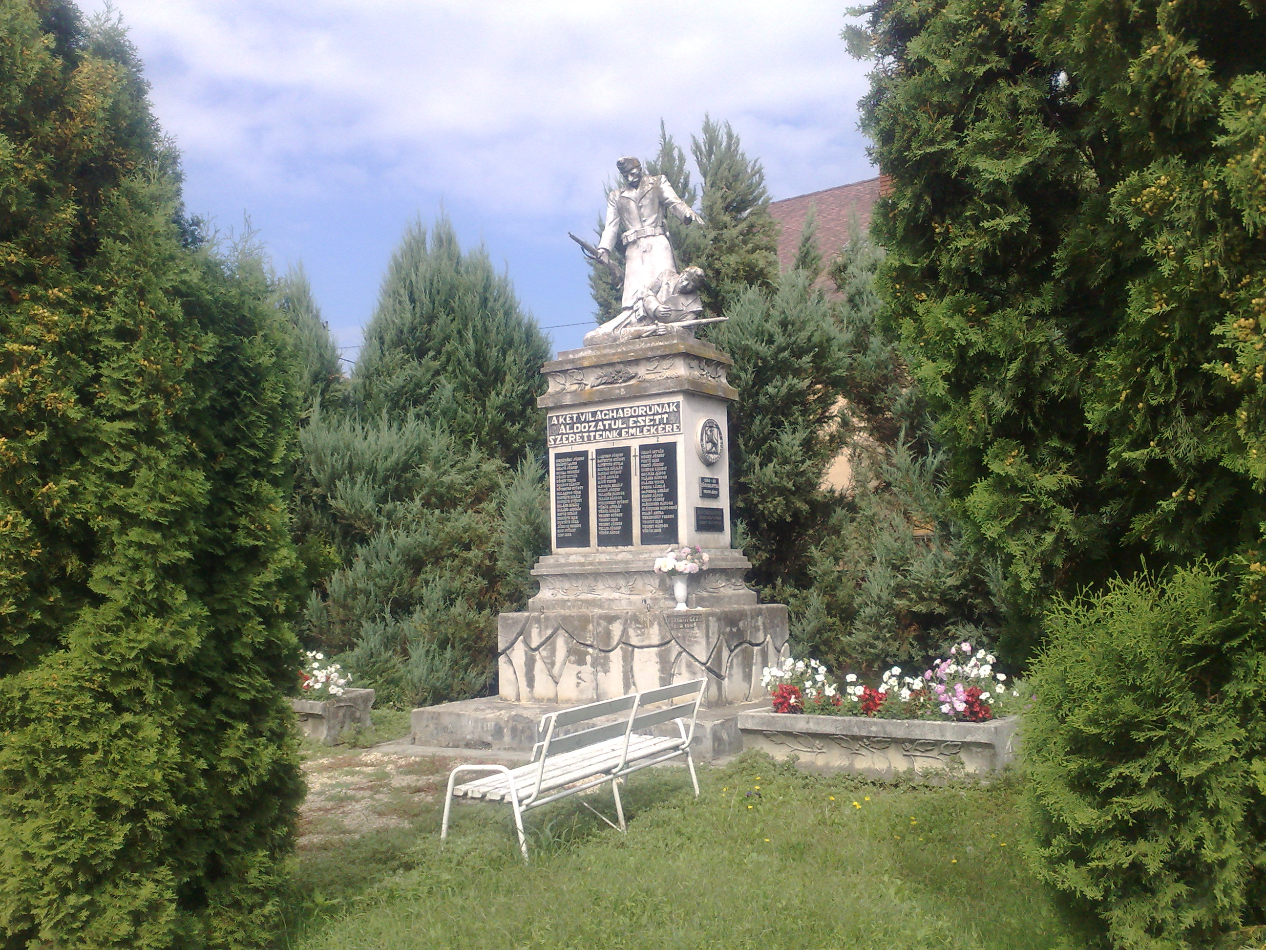 Dör - emlékmű a két világháború áldozatainak